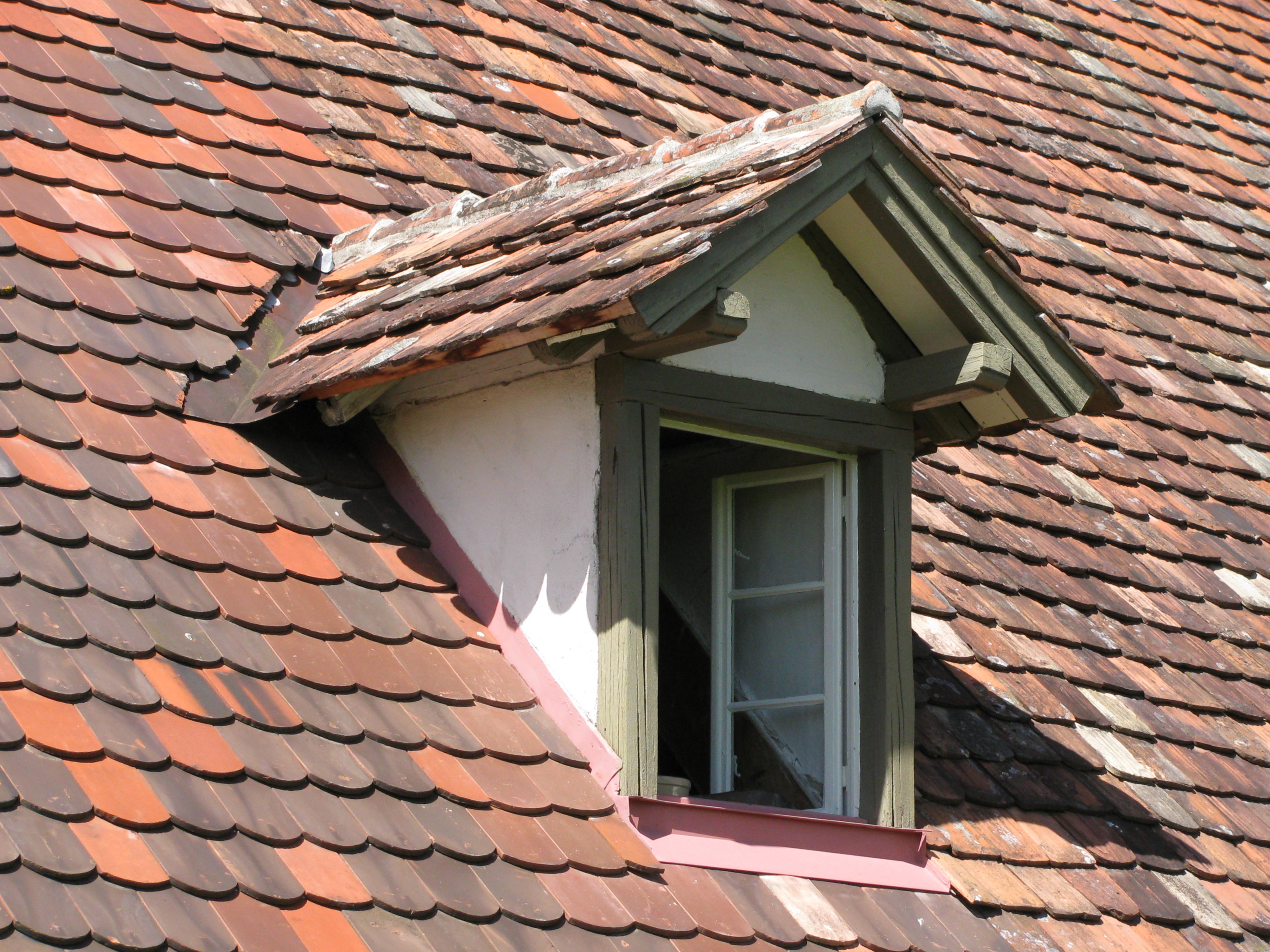 Deutschland - Baden-Württemberg - Bodenseekreis - Kressbronn am Bodensee - Retterschen: Hofanlage Milz, Dachgaube am Haupthaus. Giebelgaube.